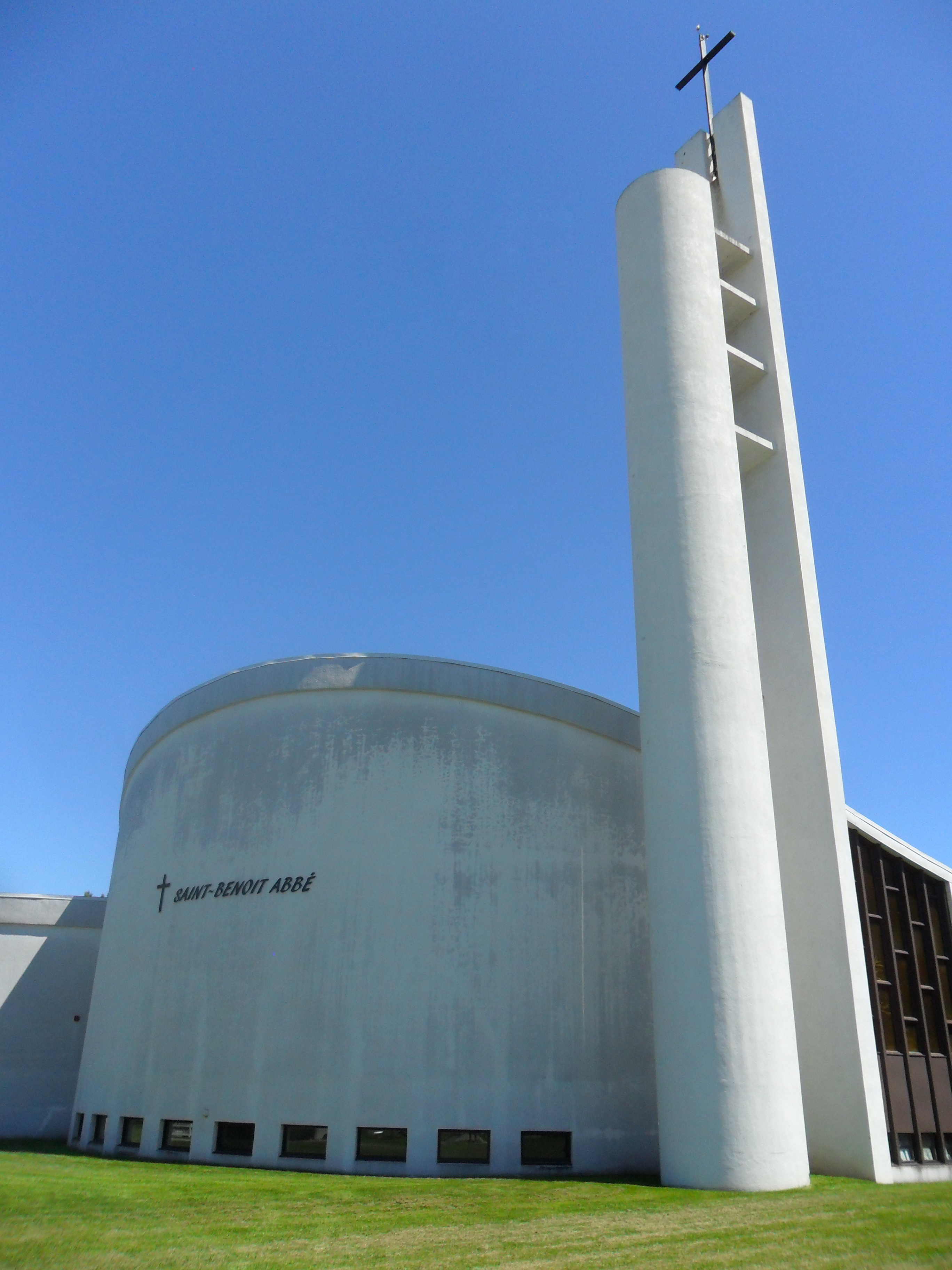 Église Saint-Benoît-Abbé